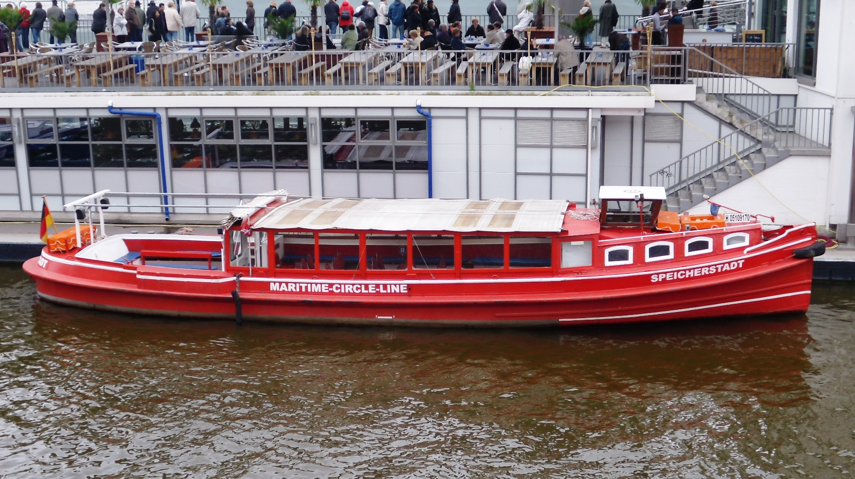 Speicherstadt, eine Barkasse der Hamburger Maritimen Circle Line